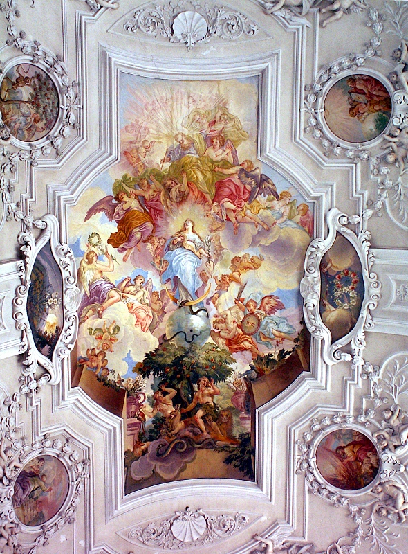 Chordeckenfresko in der Schönenbergkirche Ellwangen (Jagst): Paradiesbaum und Maria in der Apokalypse (Maler: Melchior Steidl)